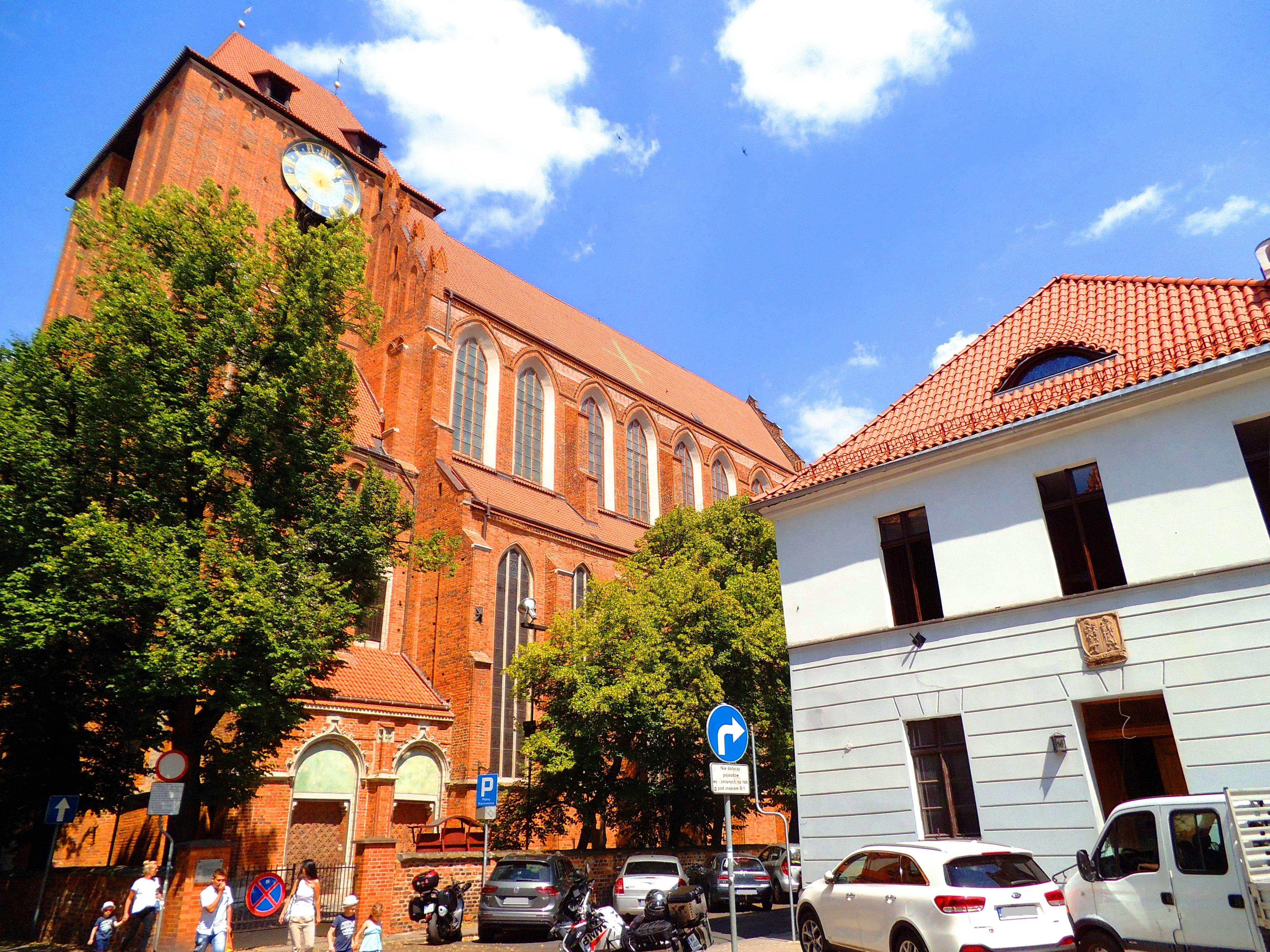 Katedra św. św. Janów w Toruniu, lato 2017 rok